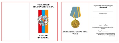 «Աշխատանքային վաստակի համար» մեդալի վկայական